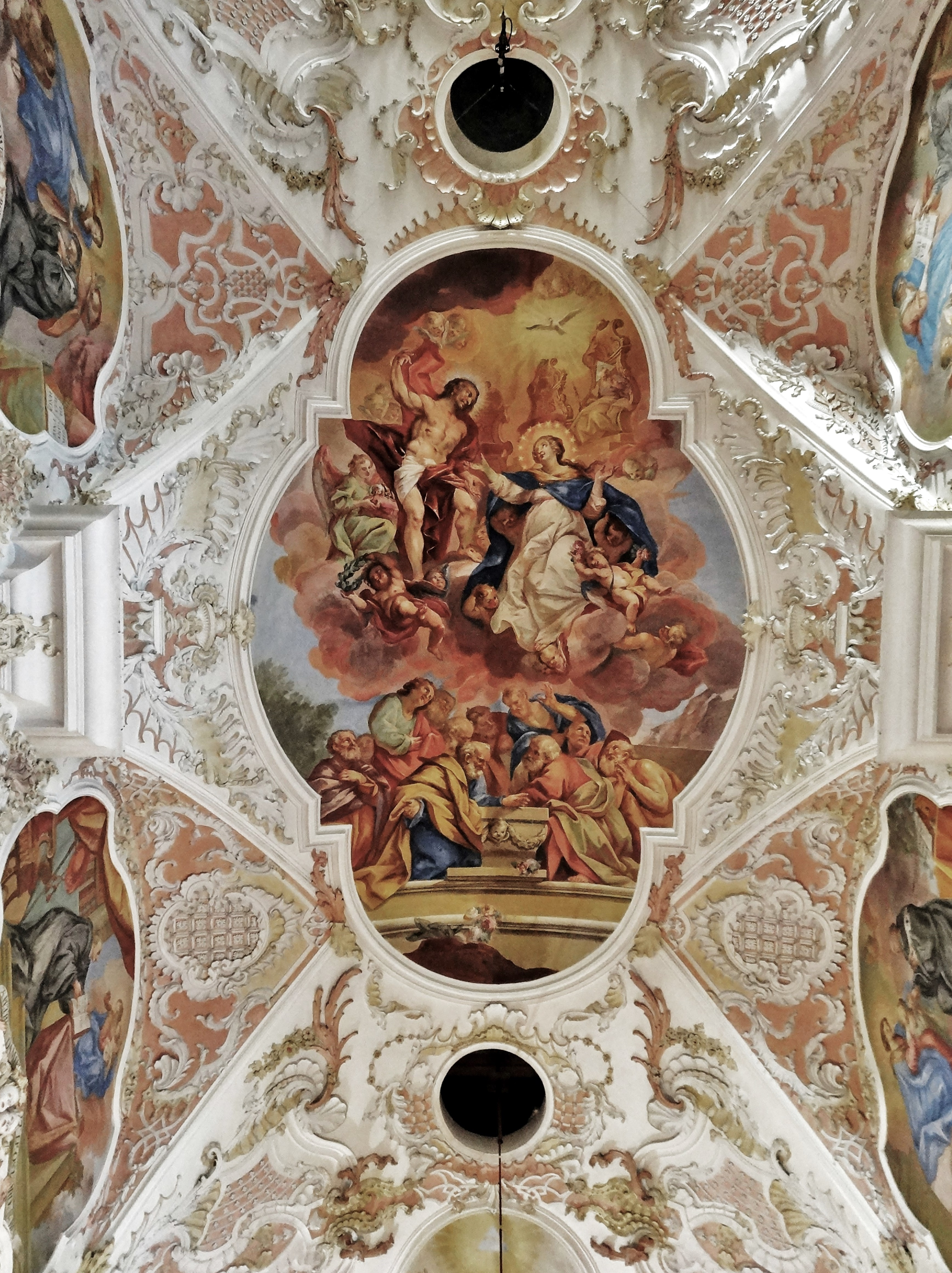 Stiftskirche Ossiach. Das Deckenfresko im Mittelschiff zeigt die Aufnahme Marias in den Himmel